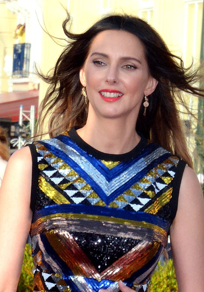 Frédérique Bel Cabourg 2019